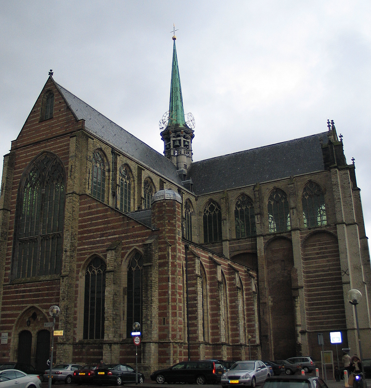 Grote kerk te Goes - eigen foto